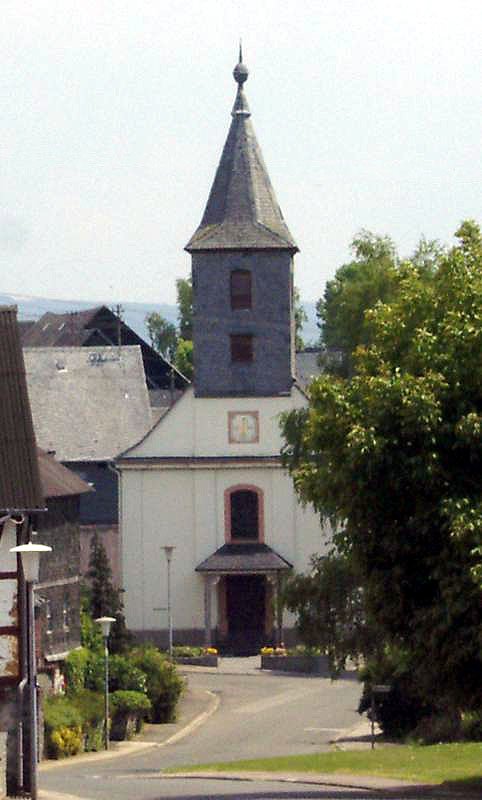 Ev. Kirche Womrath; Paul Schneider war hier von 1934-1939 Pfarrer.